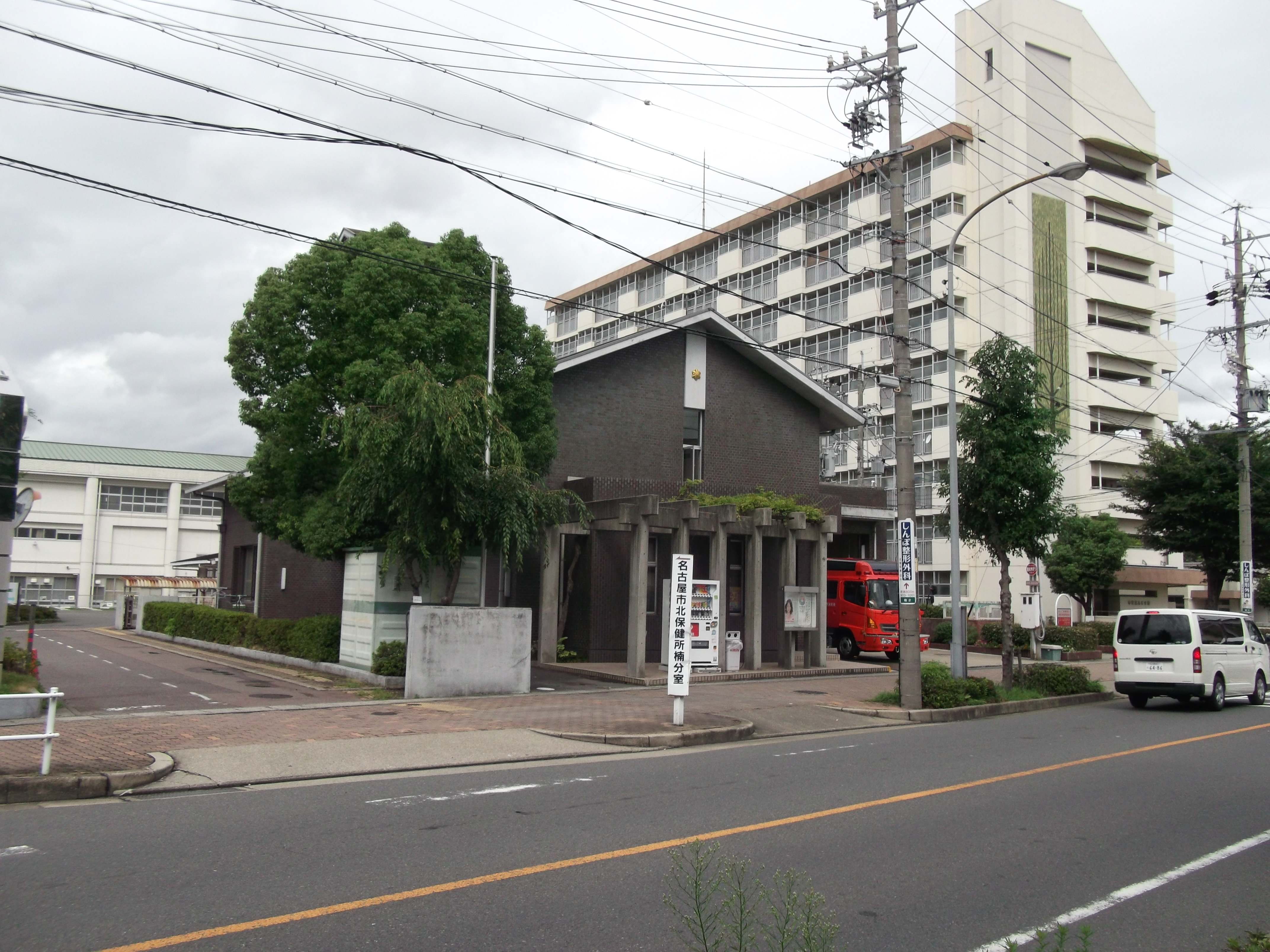 名古屋市北区にある名古屋市消防局北消防署楠出張所を東側公道より撮影